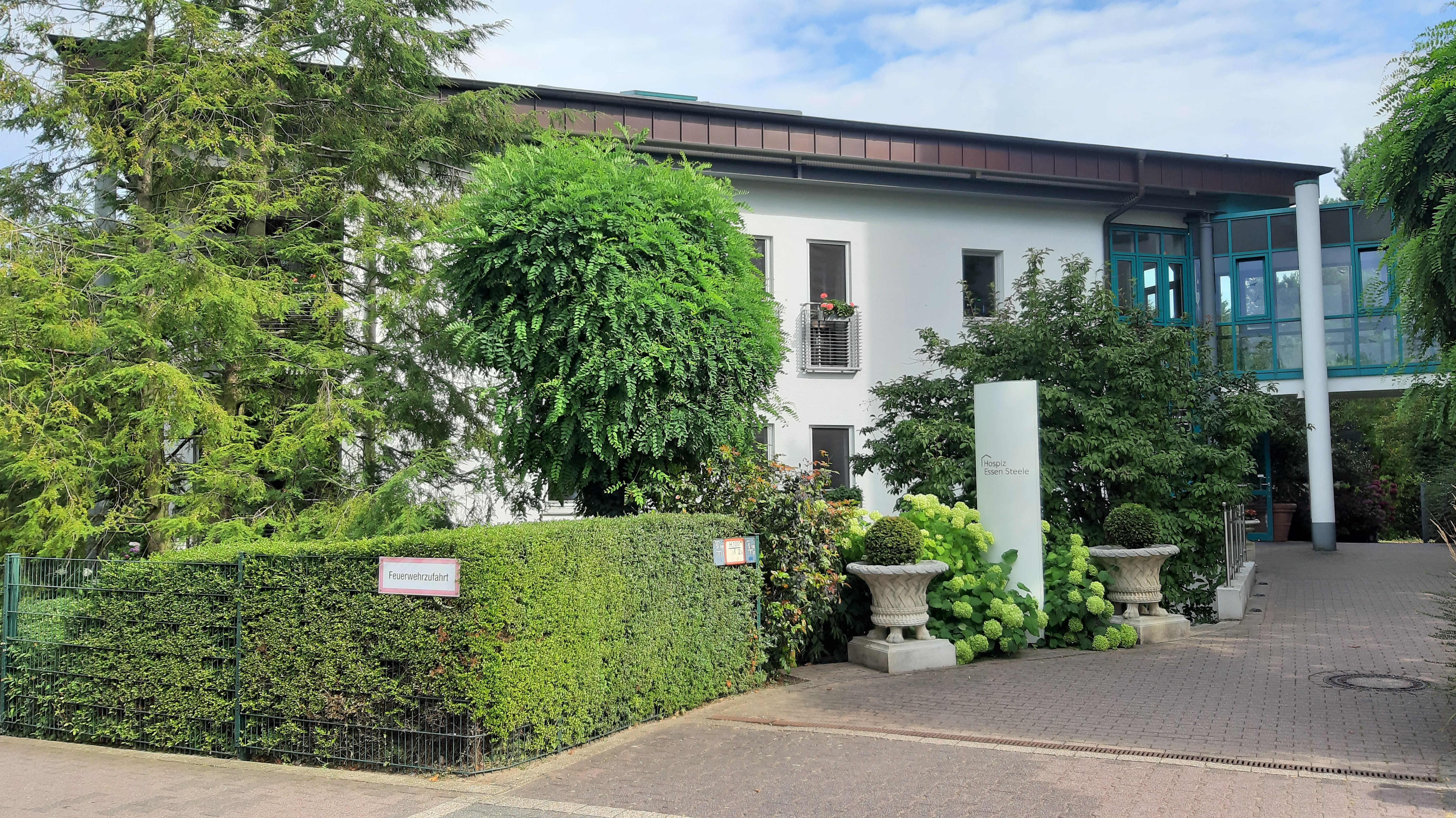 Hospiz in Essen-Steele